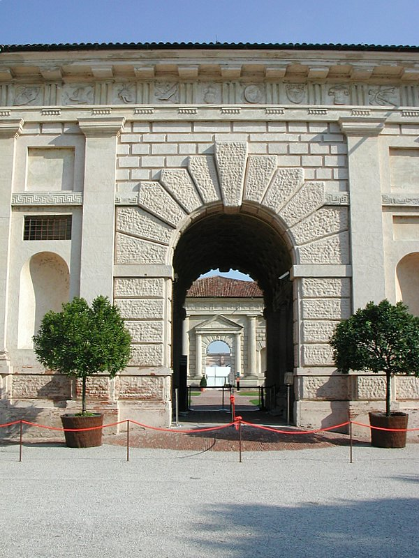 Palazzo Te di Mantova Source: photo uploaded by User:RicciSpeziari. Photographer: Riccardo Speziari